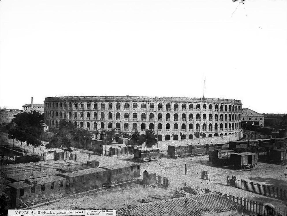 Plaça de Bous de València, 1870. Fotografia de Jean Laurent